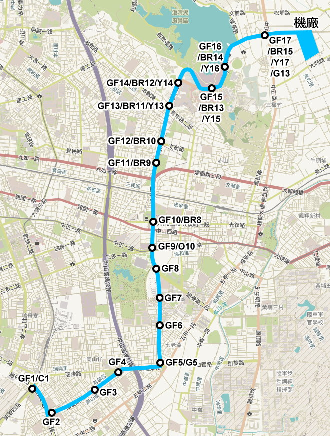 2008年頃的鳳山線